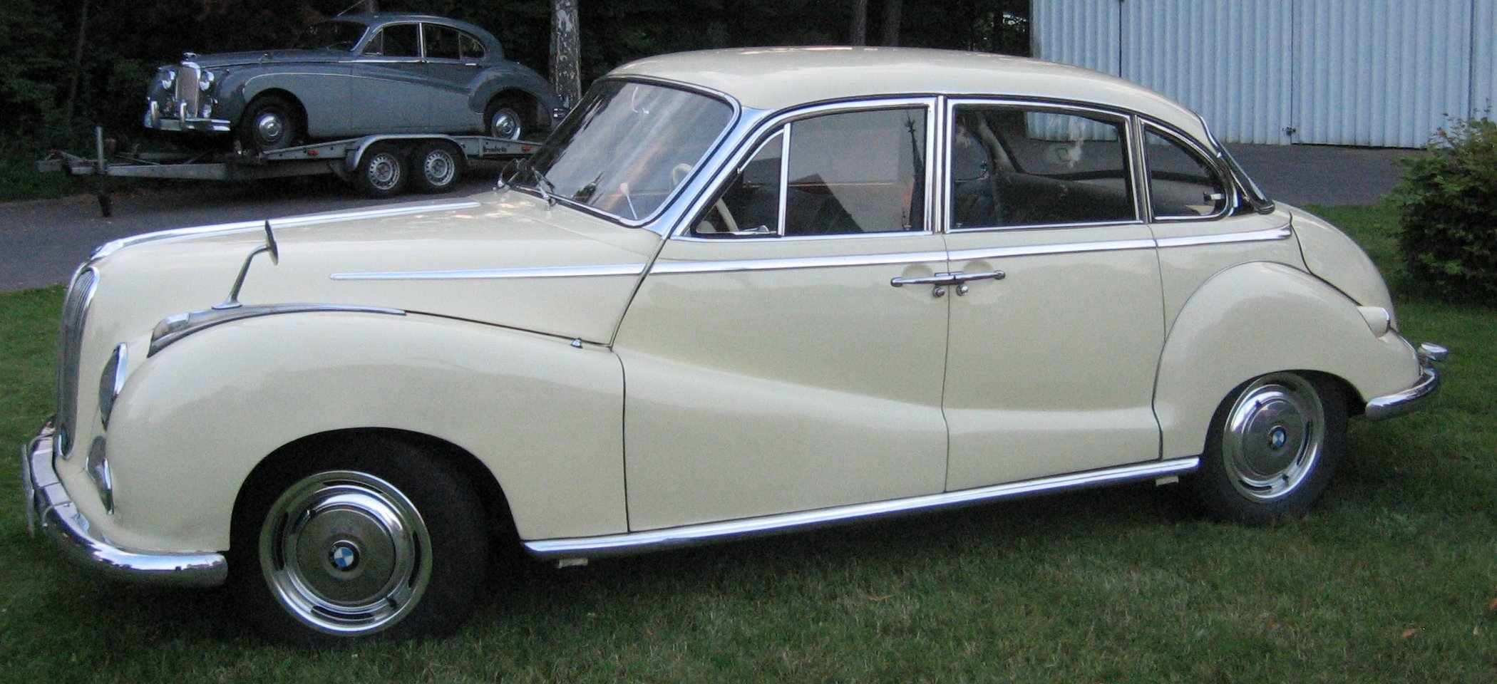 BMW Barockengel